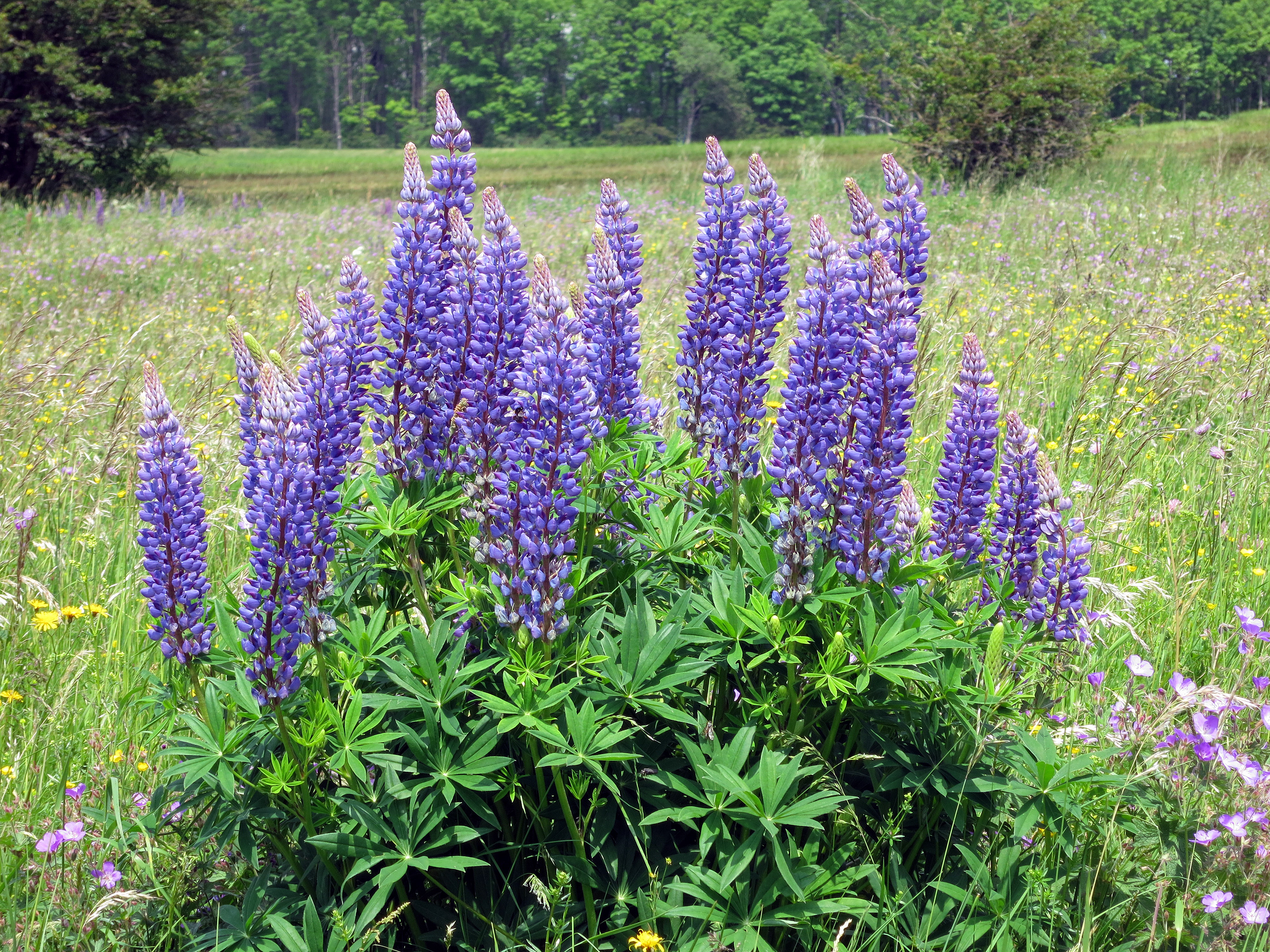 Die Vielblättrige Lupine (Lupinus polyphyllus) in der Rhön auf etwa 700 m über Normalnull.